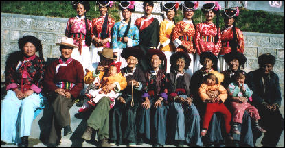 Une famille élargie Moso : enfants, adultes et anciens cohabitant ensemble